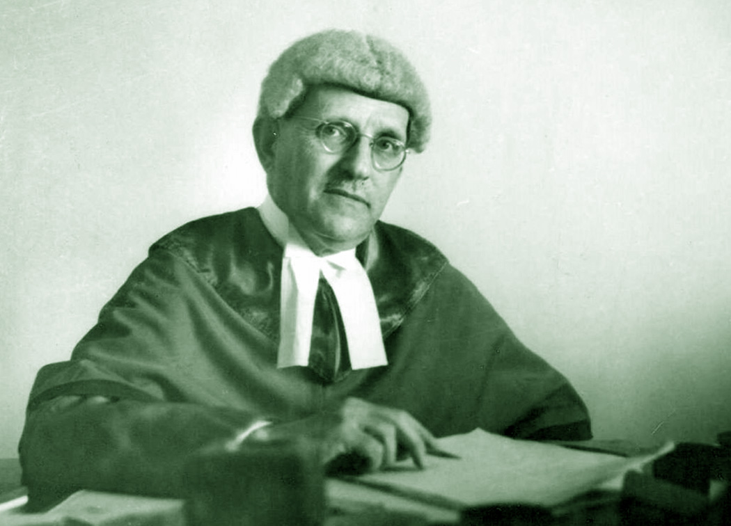 עיבוד לצילום של השופט גד פרומקין משנות ה-30